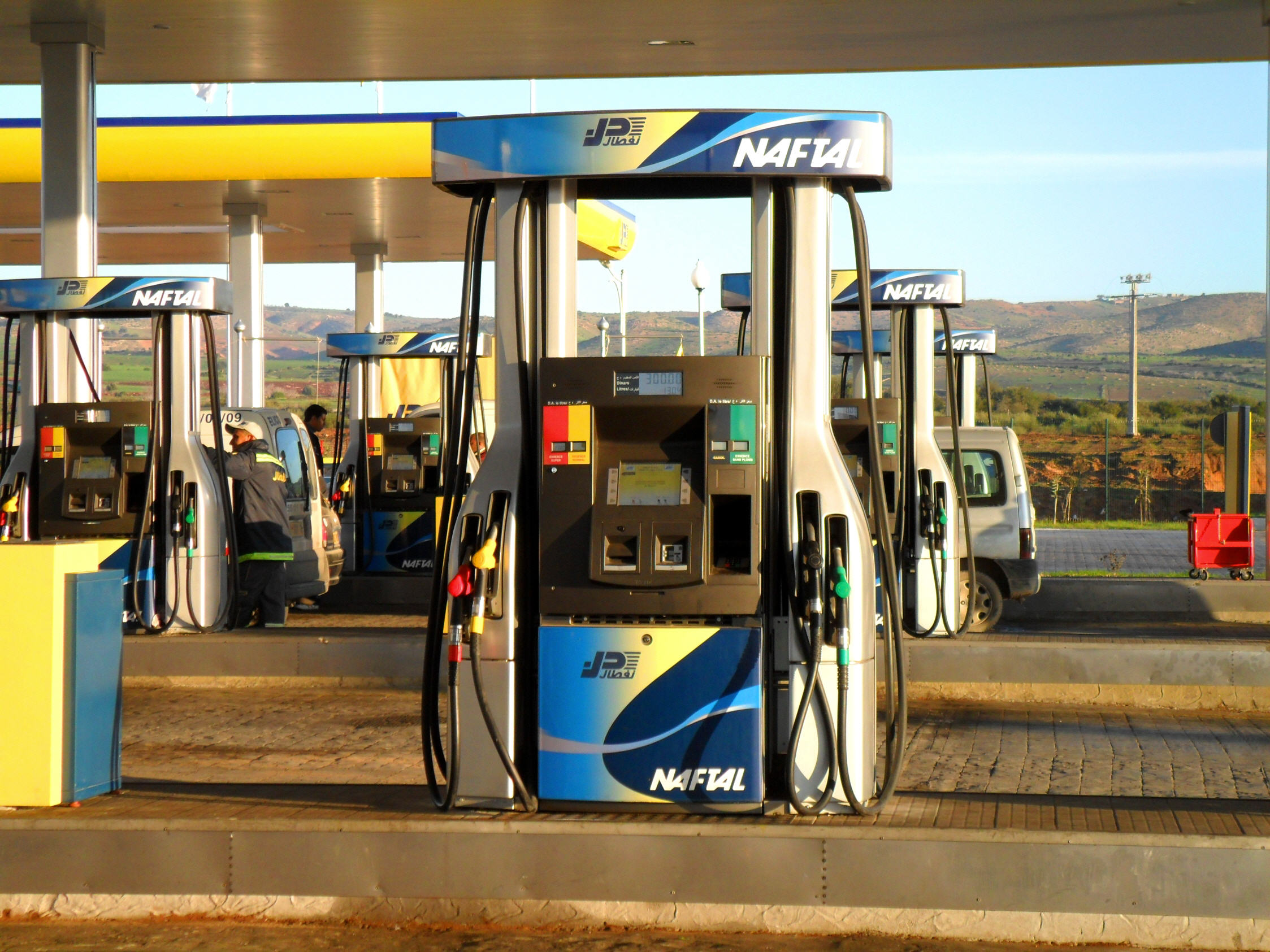 اول محطة بنزين على الطريق السيار شرق غرب - غليزان